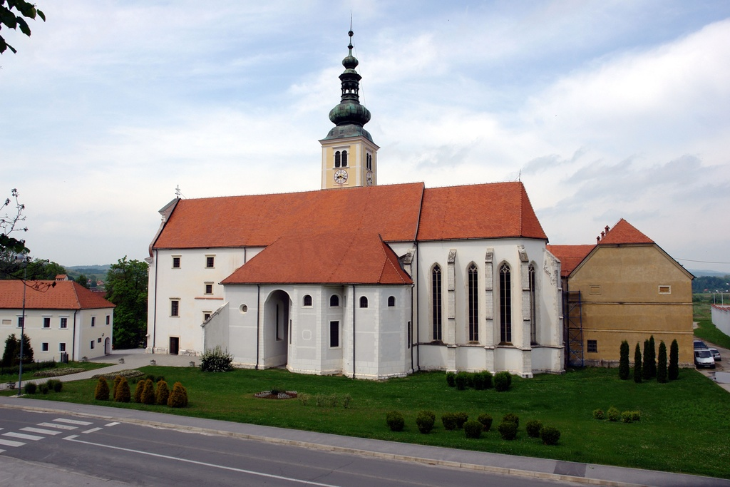 Lepoglava, pálos templom